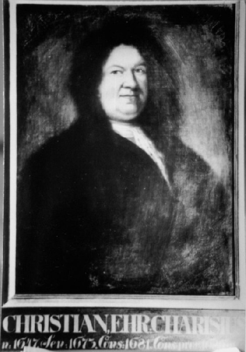 Christian Ehrenfried Charisius (* 1647; † 1697), deutscher Politiker und Bürgermeister Stralsunds.